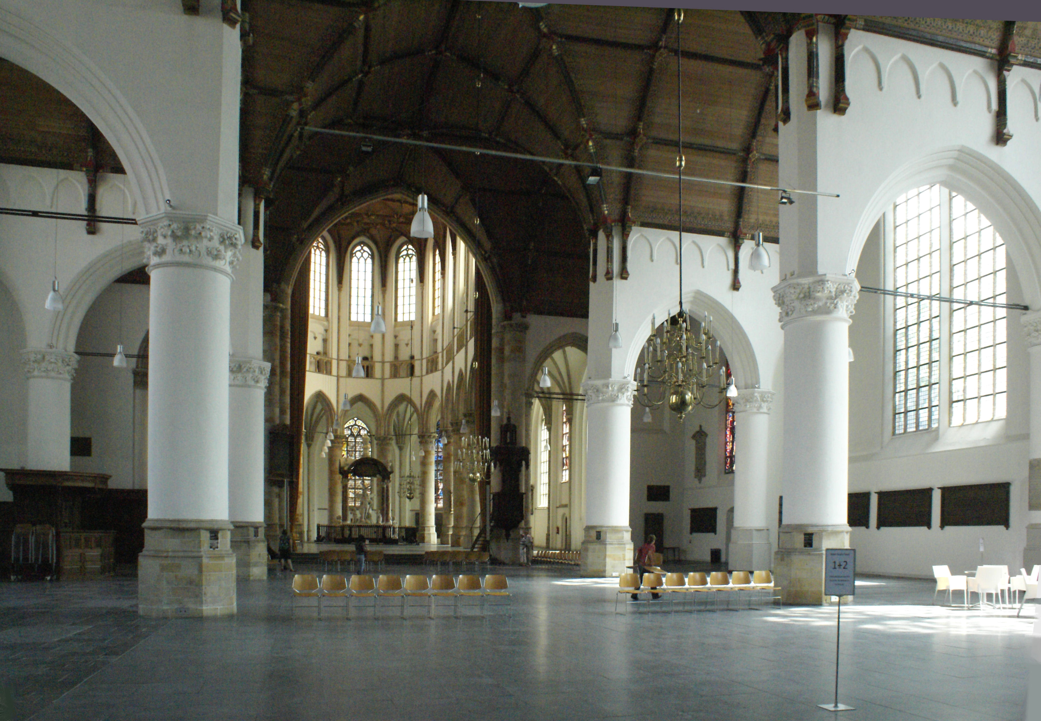 Schip met zijbeuken en koor met kooromgang